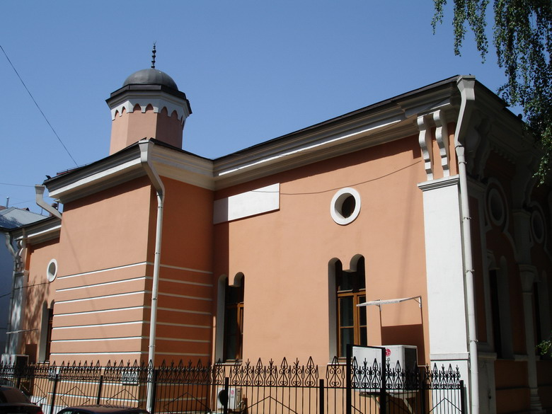 Историческая мечеть, г. Москва, Россия